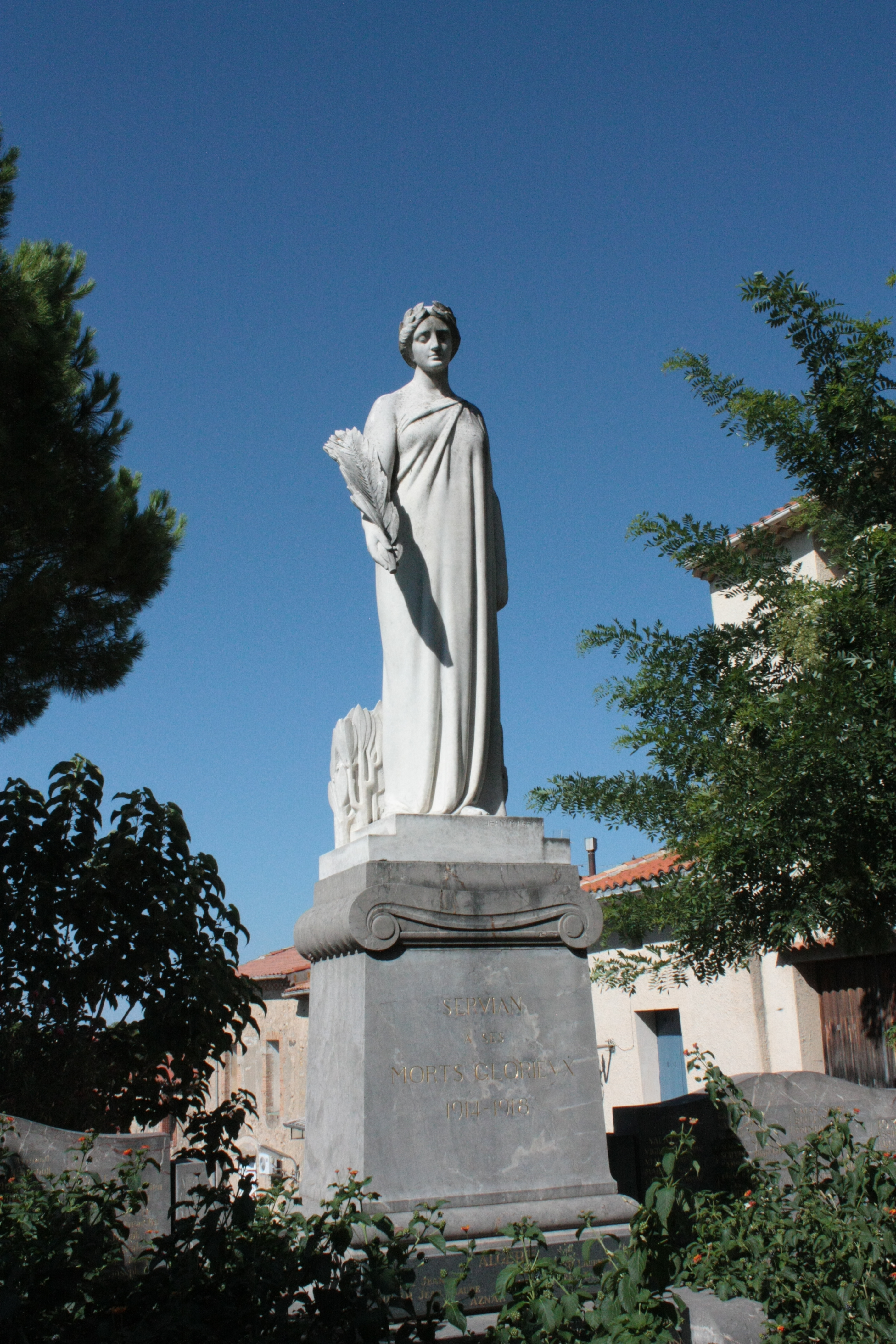 Monument aux morts de la guerre de 1914-1918 à Servian, de Jean Marie Joseph Magrou